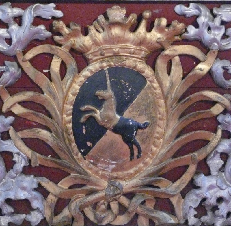 Erb Jeníšků z Újezda v Bubovickém kostele, okres Příbram